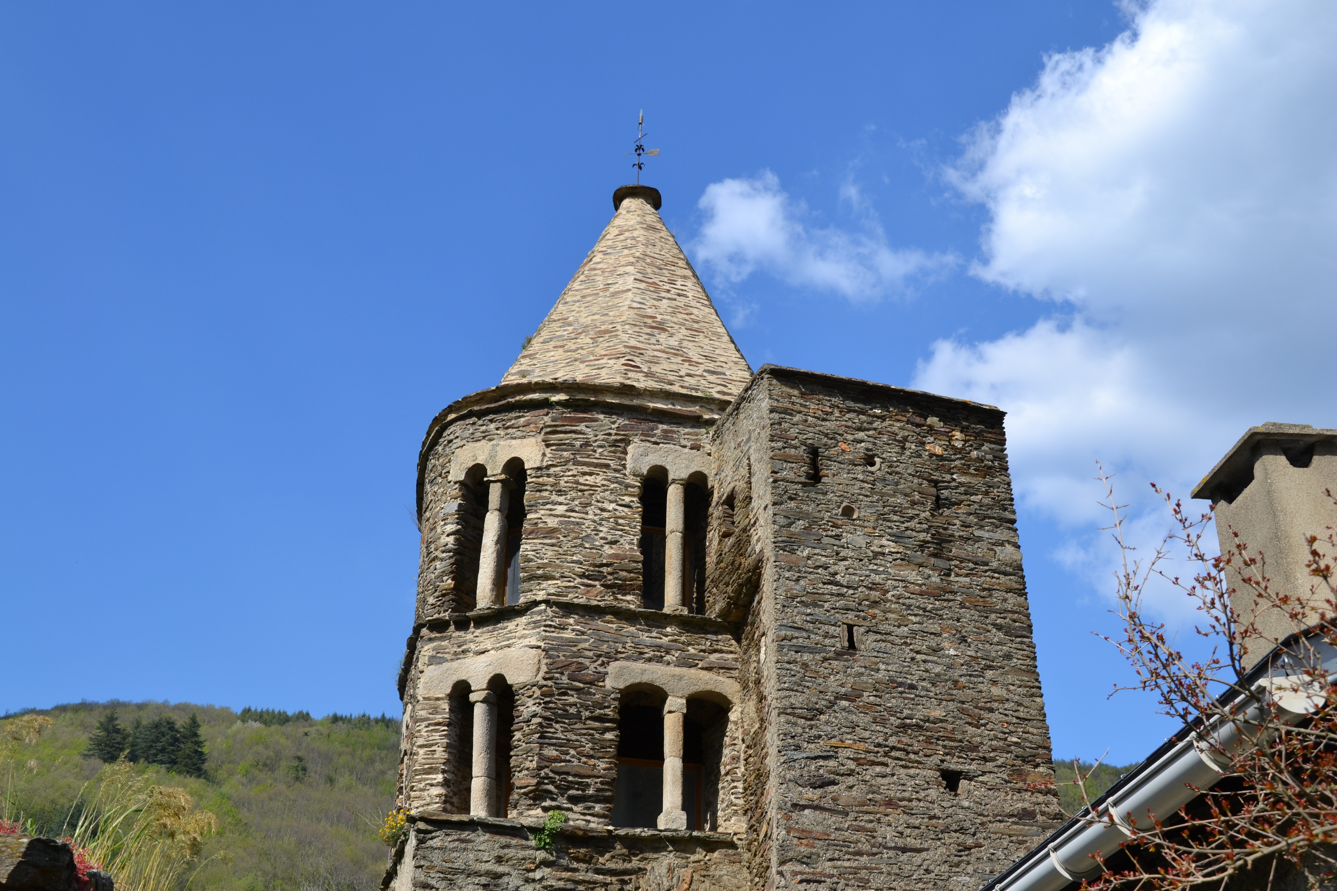 Clocher de l'église Sainte Anne, village de La Tourette-Cabardès, département de l'Aude, France